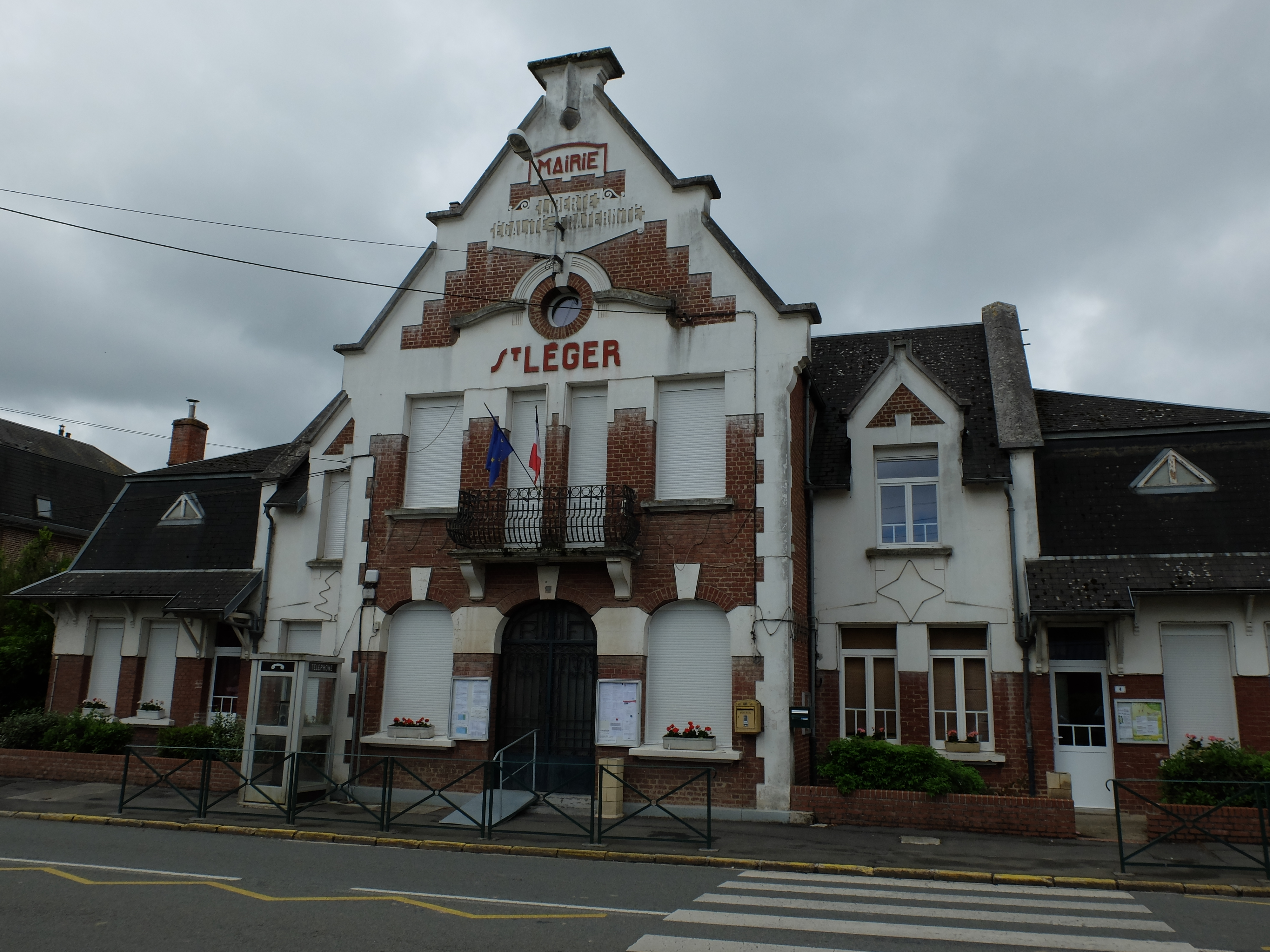 Vue de la mairie de Saint-Léger (Pas-de-Calais).